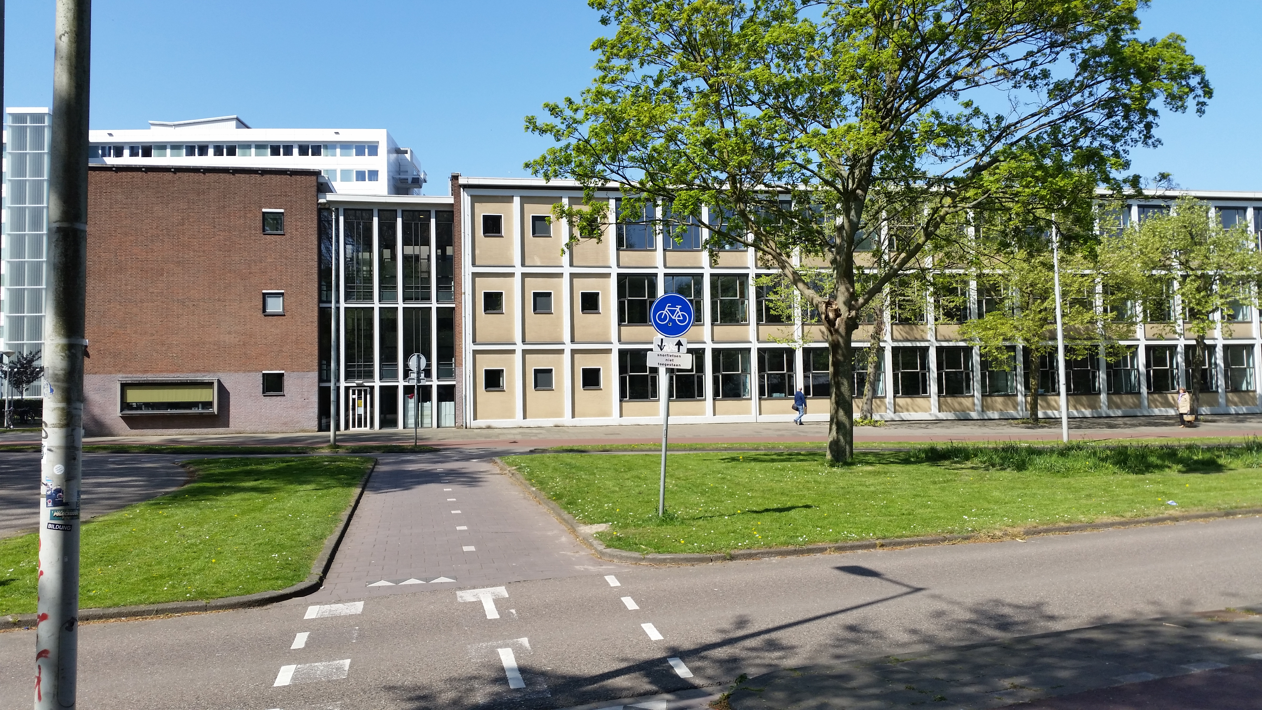 Impressie van monument Nobelweg 4-6 te Amsterdam (april 2020)